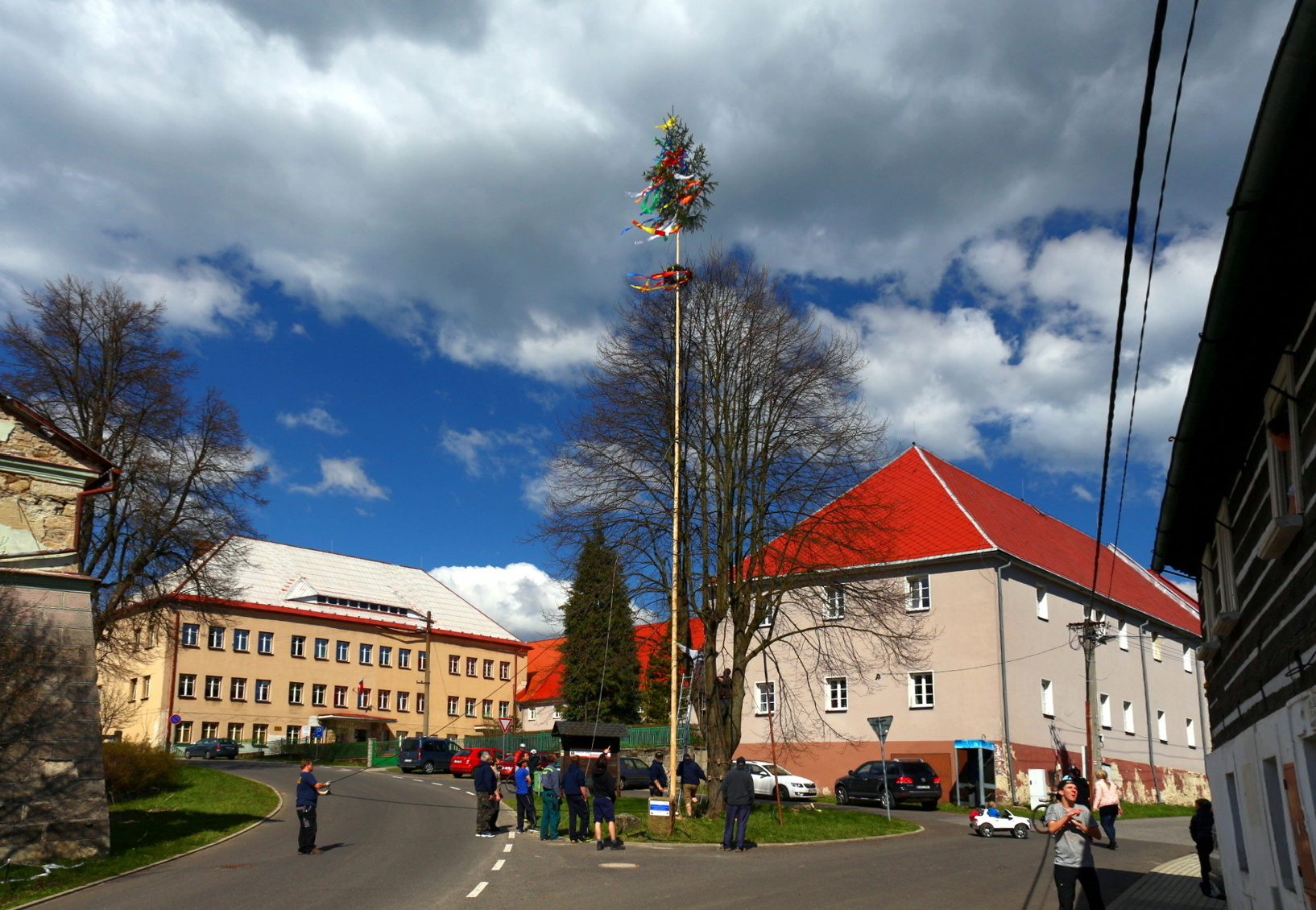 Krompach